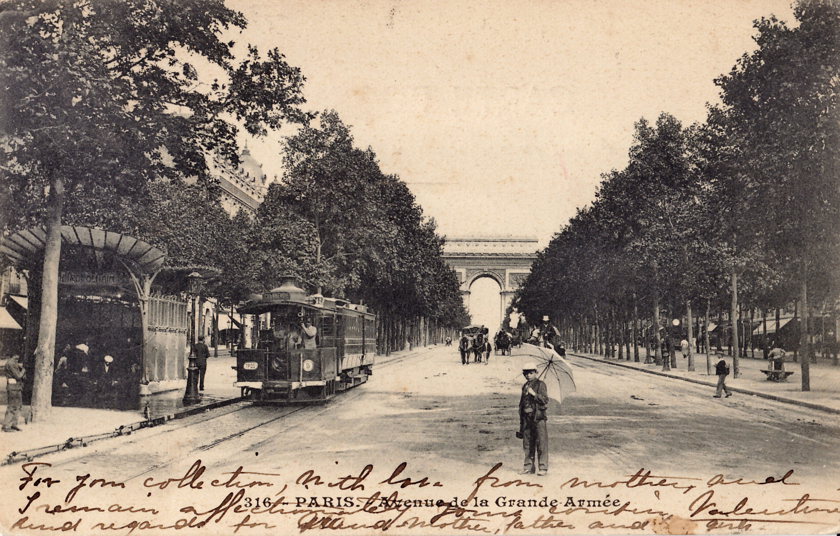 Carte postale ancienne sans mention d'éditeur, n°316 : PARIS - Avenue de la Grande-Armée